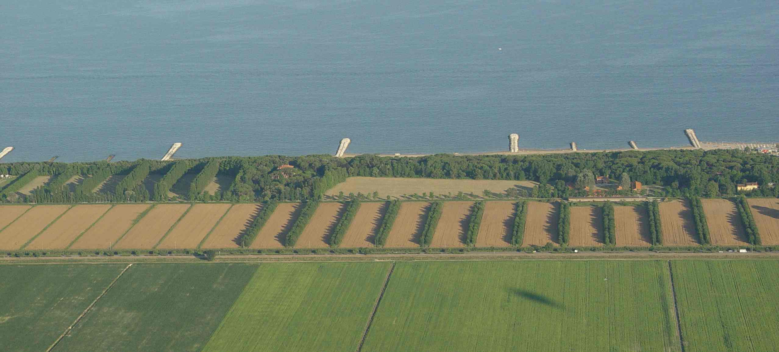 Foto panoramica della costa veneziana (Eracleamare).